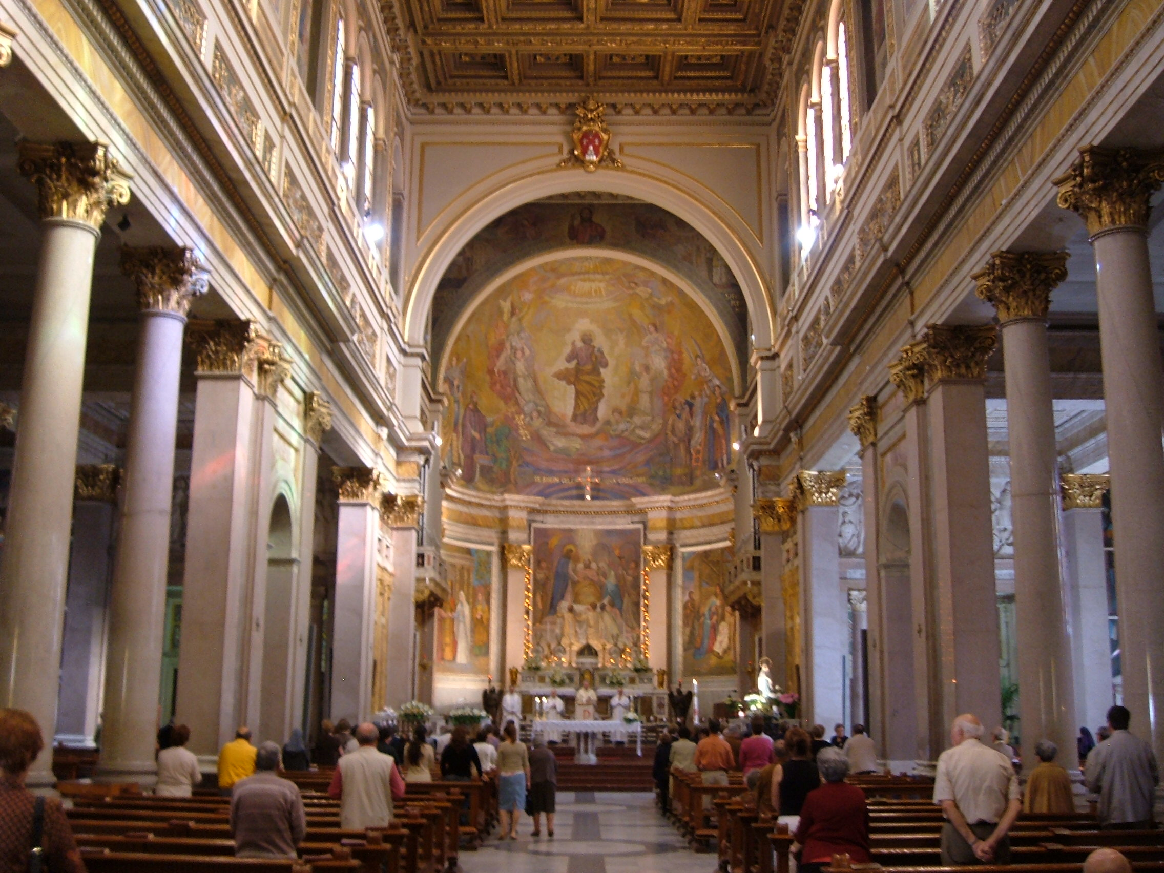 San Giuseppe al Trionfale (Rome): interno.